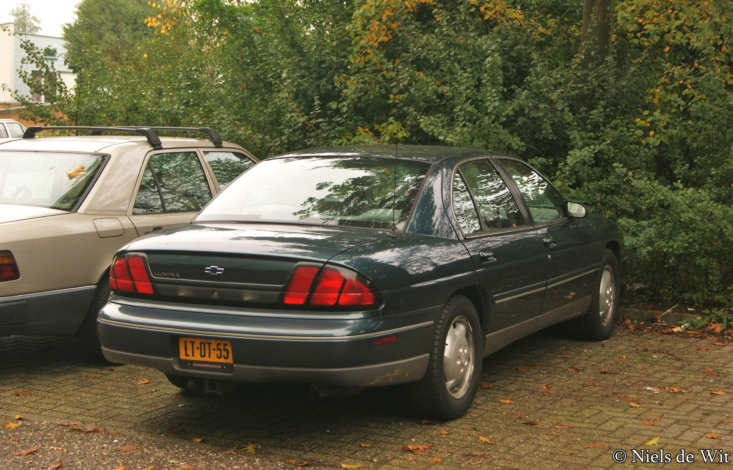 LT-DT-55